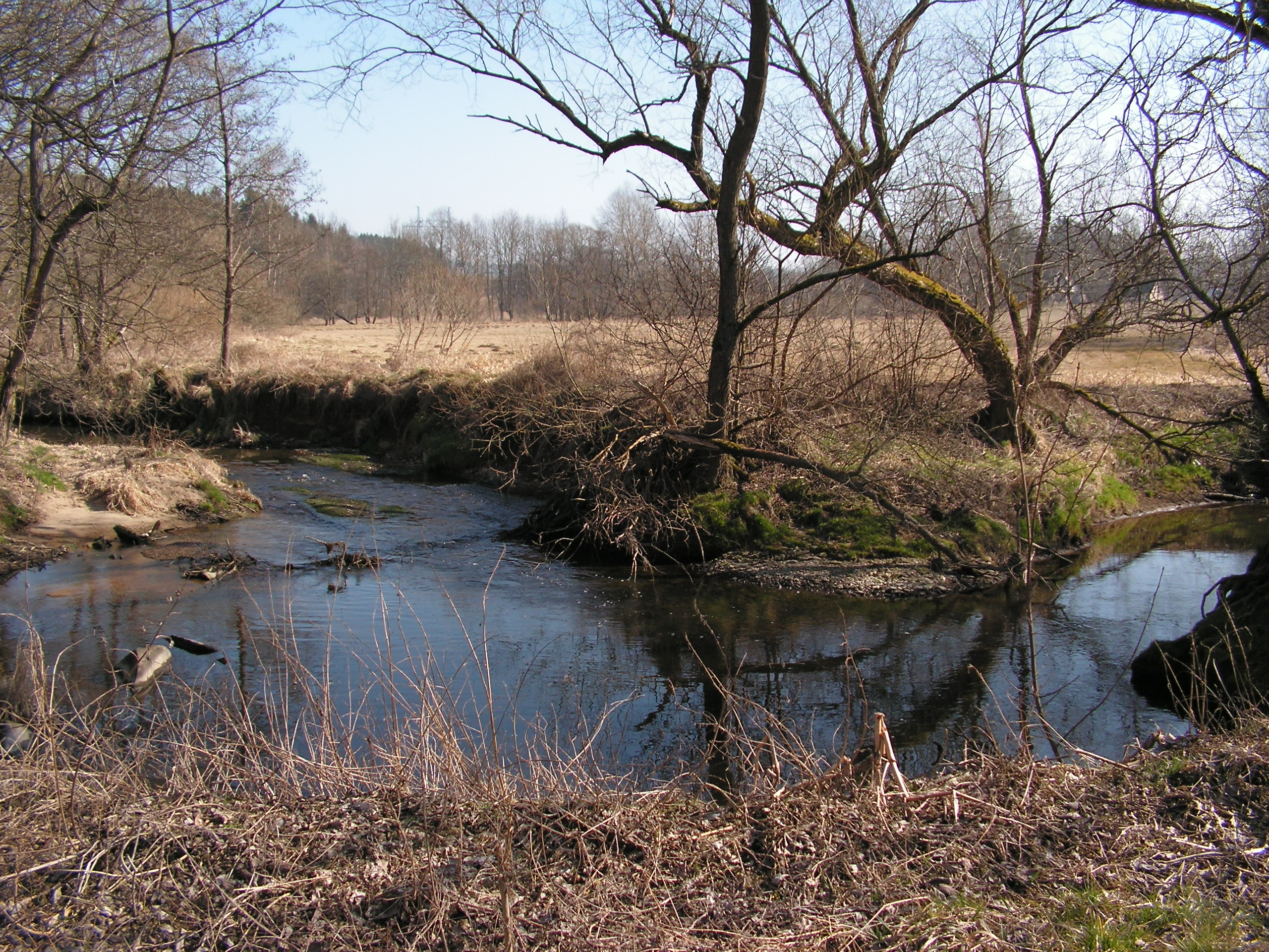 Meandr Chrudimky nedaleko Královy Pily v okrese Chrudim